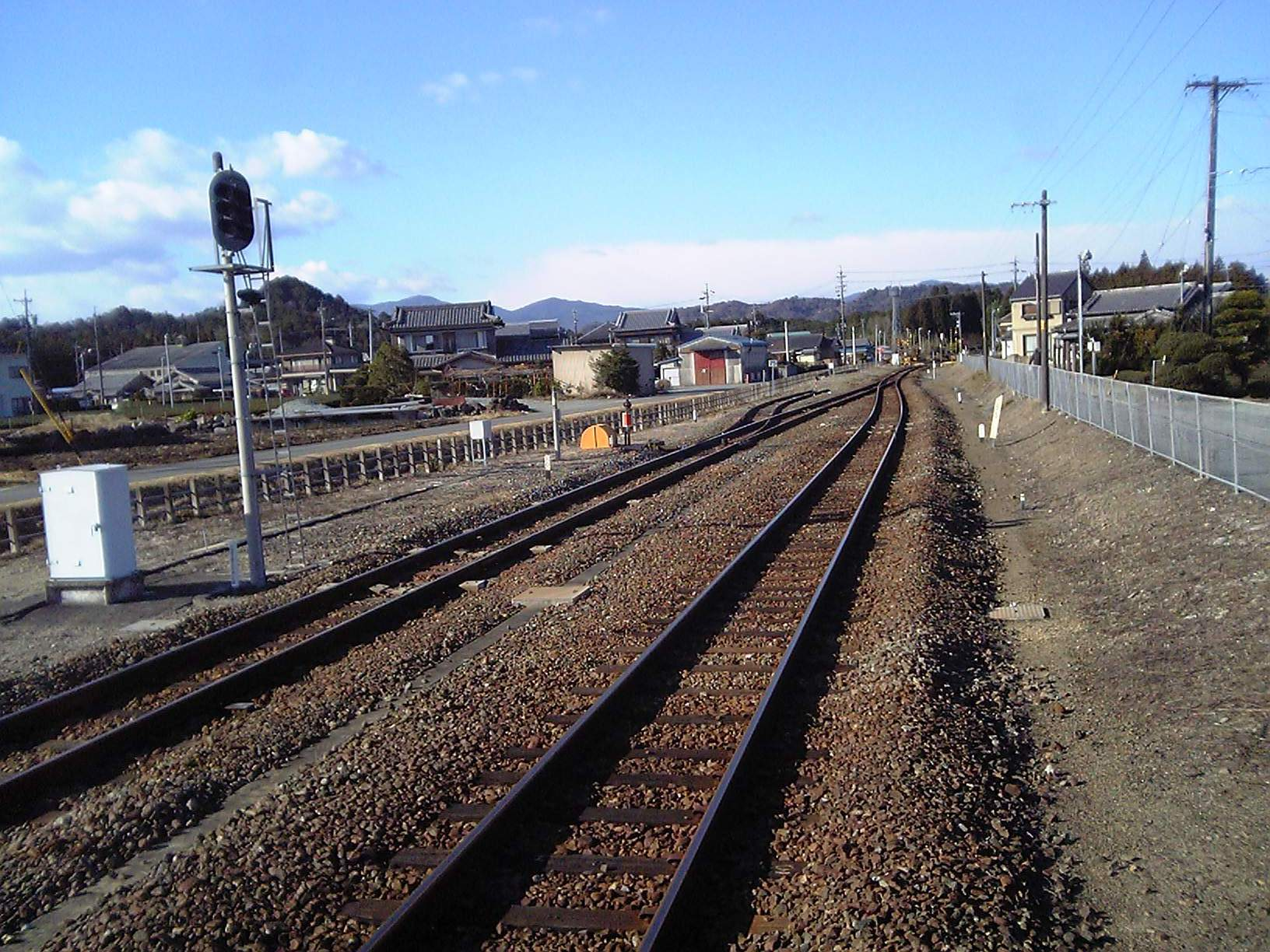 栃原駅ホームから佐奈駅方面